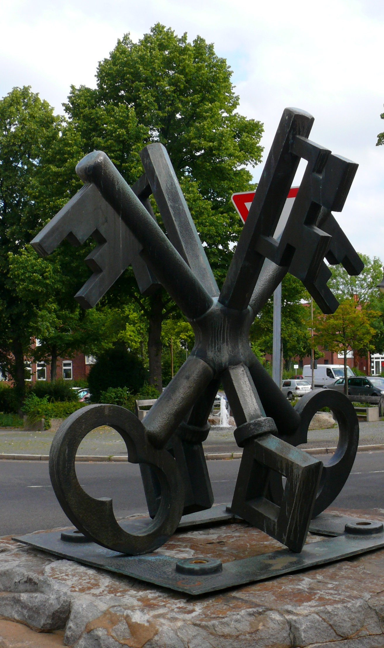 Das Schlüsseldenkmal auf dem Gänsemarkt erinnert an "den Aufenthalt des Hauptquartiers der 2. britischen Panzerdivision in Lübbecke 1958 - 1982. ... Die 2. Panzerdivision und die Stadt Lübbecke haben gekreuzte Schlüssel als Emblem. Die doppelt gekreuzten Schlüssel der Skulptur symbolisieren die enge Freundschaft , die zwischen dem Hauptquartier und der Stadt während dieses Zeitraums bestand." (Inschrift am Schlüsseldenkmal)